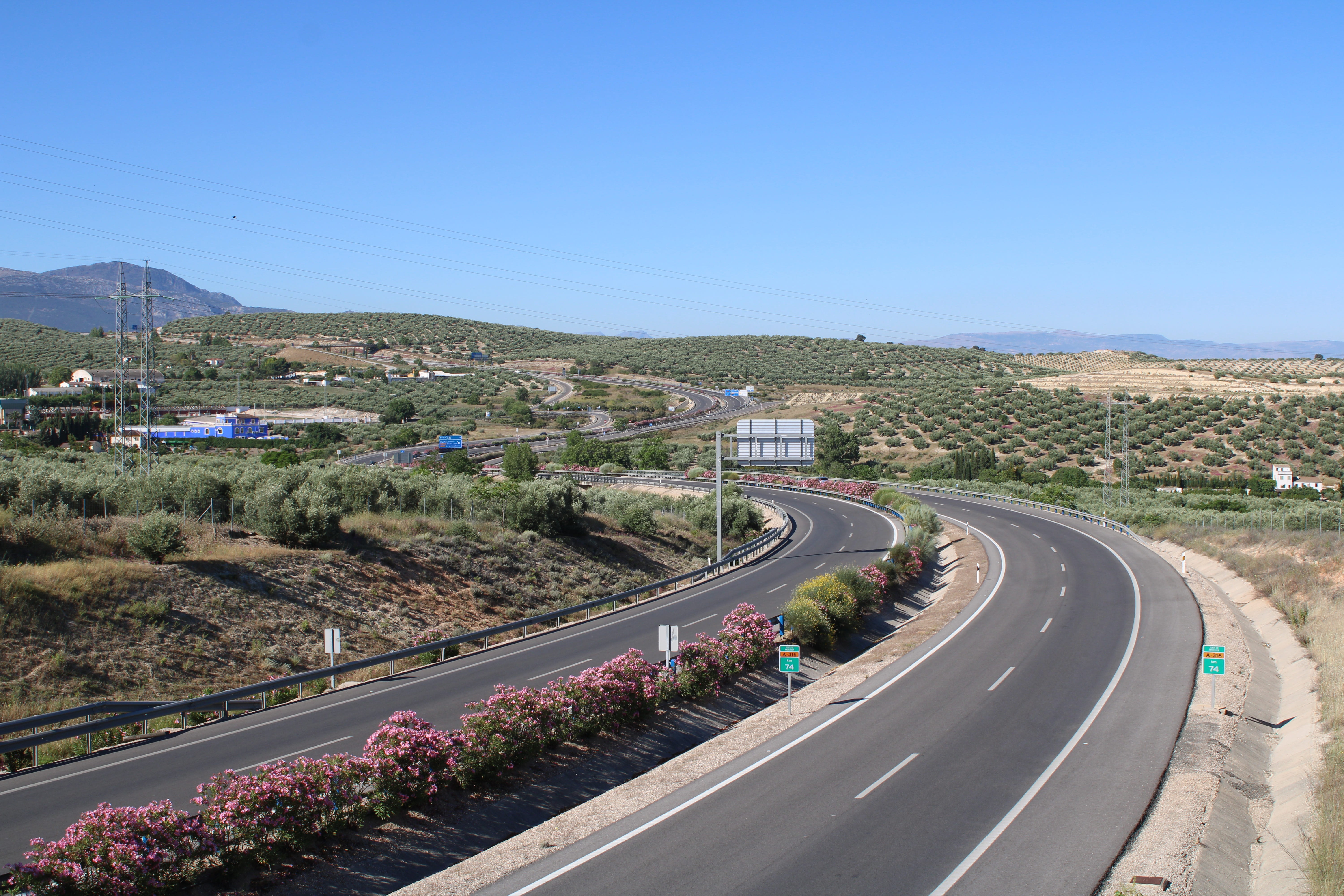 Autovía del olivar - circunvalación de Martos, Jaén (España)